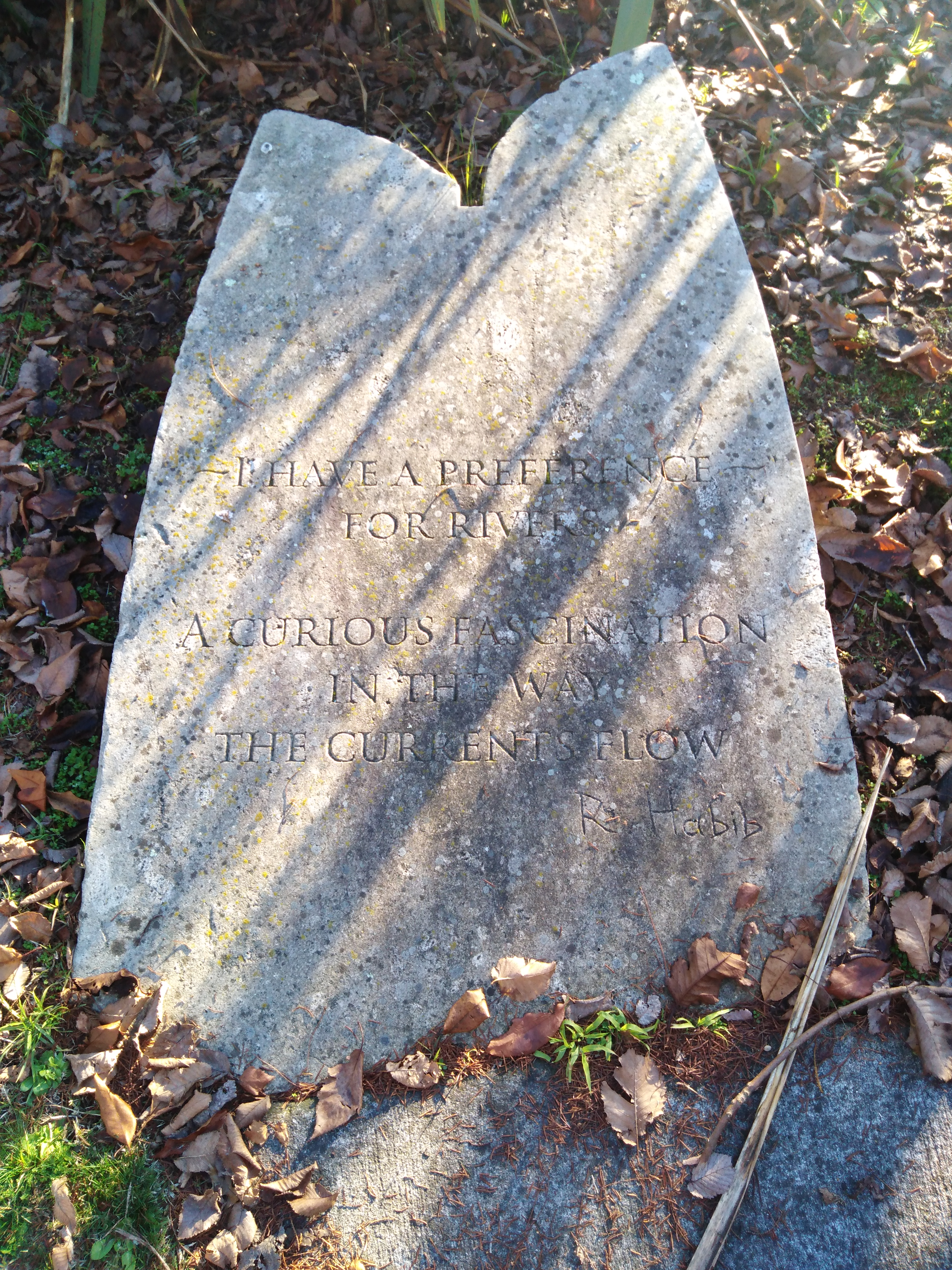 Poema de Rowley Habib en Taupo